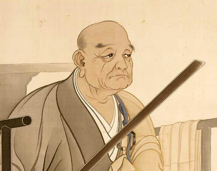 掛軸絹本設色，159.7 x 84.7厘米 說明 : 作者經考據禪宗公案，描繪出“當頭棒喝”的坐姿；圖中人物應為馬祖道一。